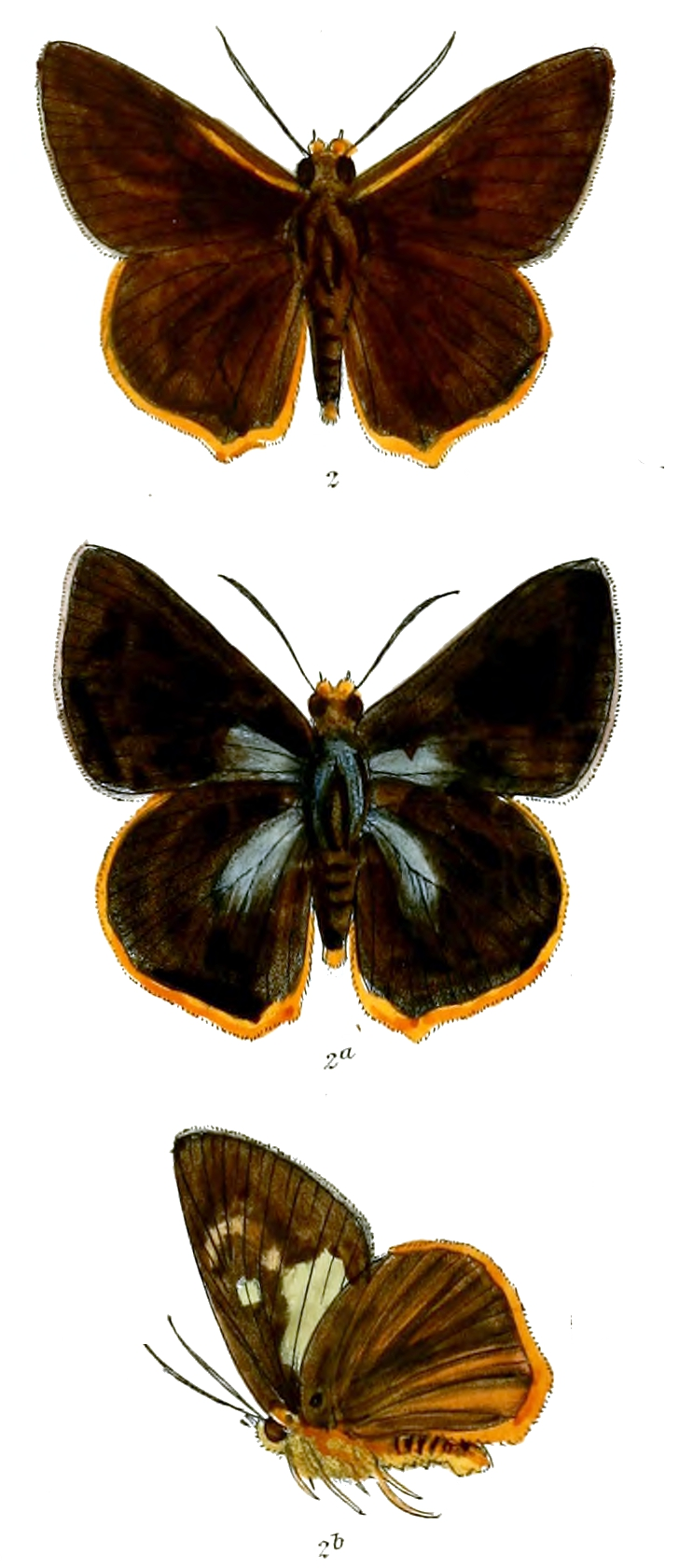 Gecana jaina = Bibasis jaina (male, female, male underside)